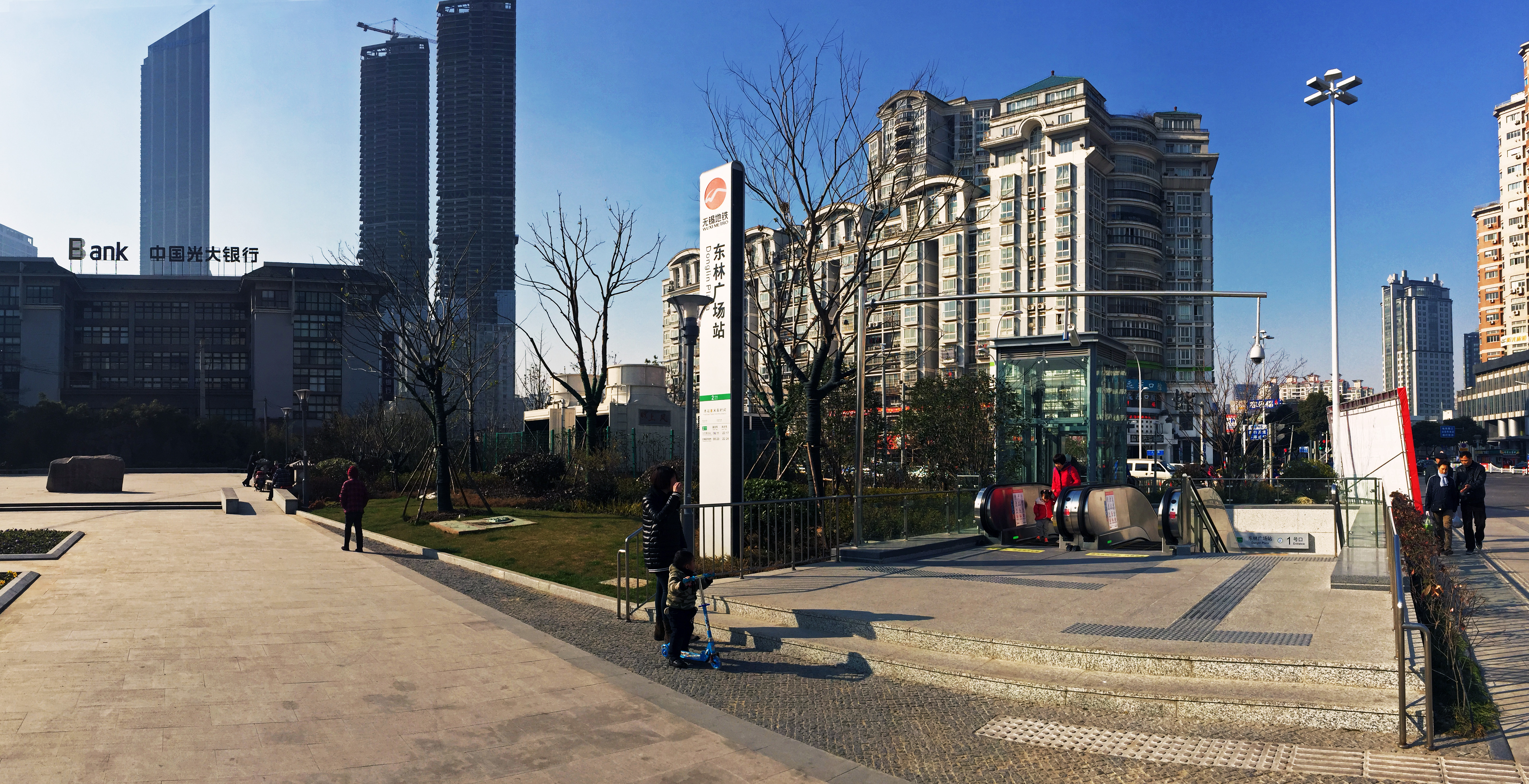 無錫地鐵2號線東林廣場站1號出入口